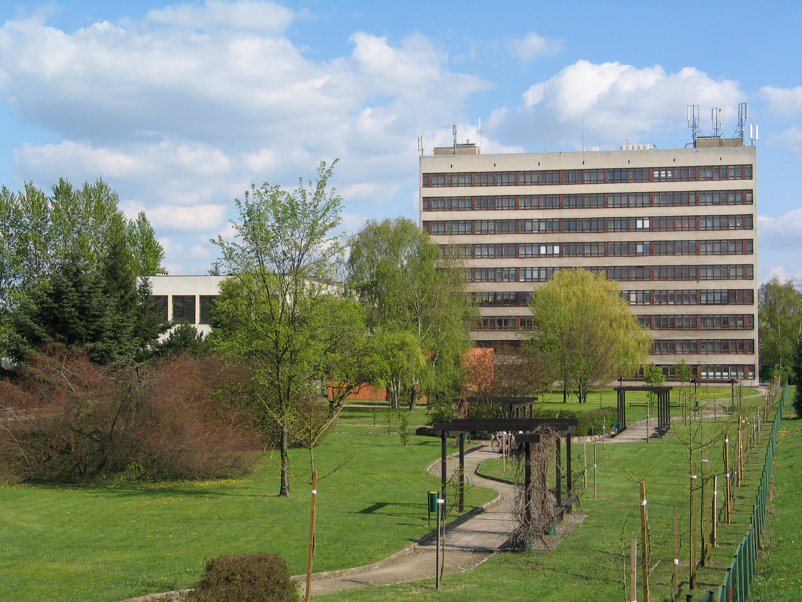 Uniwersytet Przyrodniczy w Poznaniu